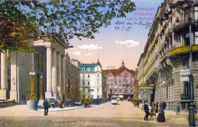 Stuttgart, Schloßstraße (heute Bolzstraße). Blick vom Schlossplatz zum Friedrichsbau-Theater. Der Centralbahnhof befindet sich auf der rechten Seite. (Postkarte)